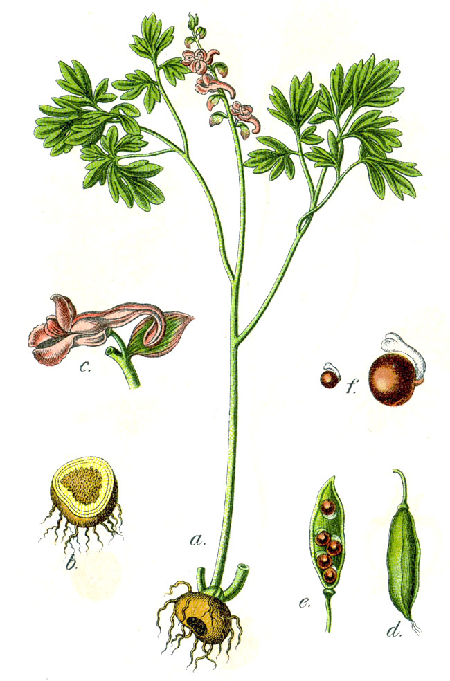 Corydalis cava subsp. cava, syn. Fumaria cava Mill. Original Caption Hohlwurz, Fumaria cava